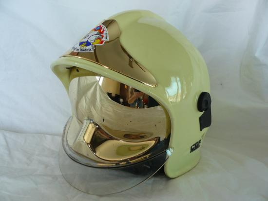 casque pompiers brussel